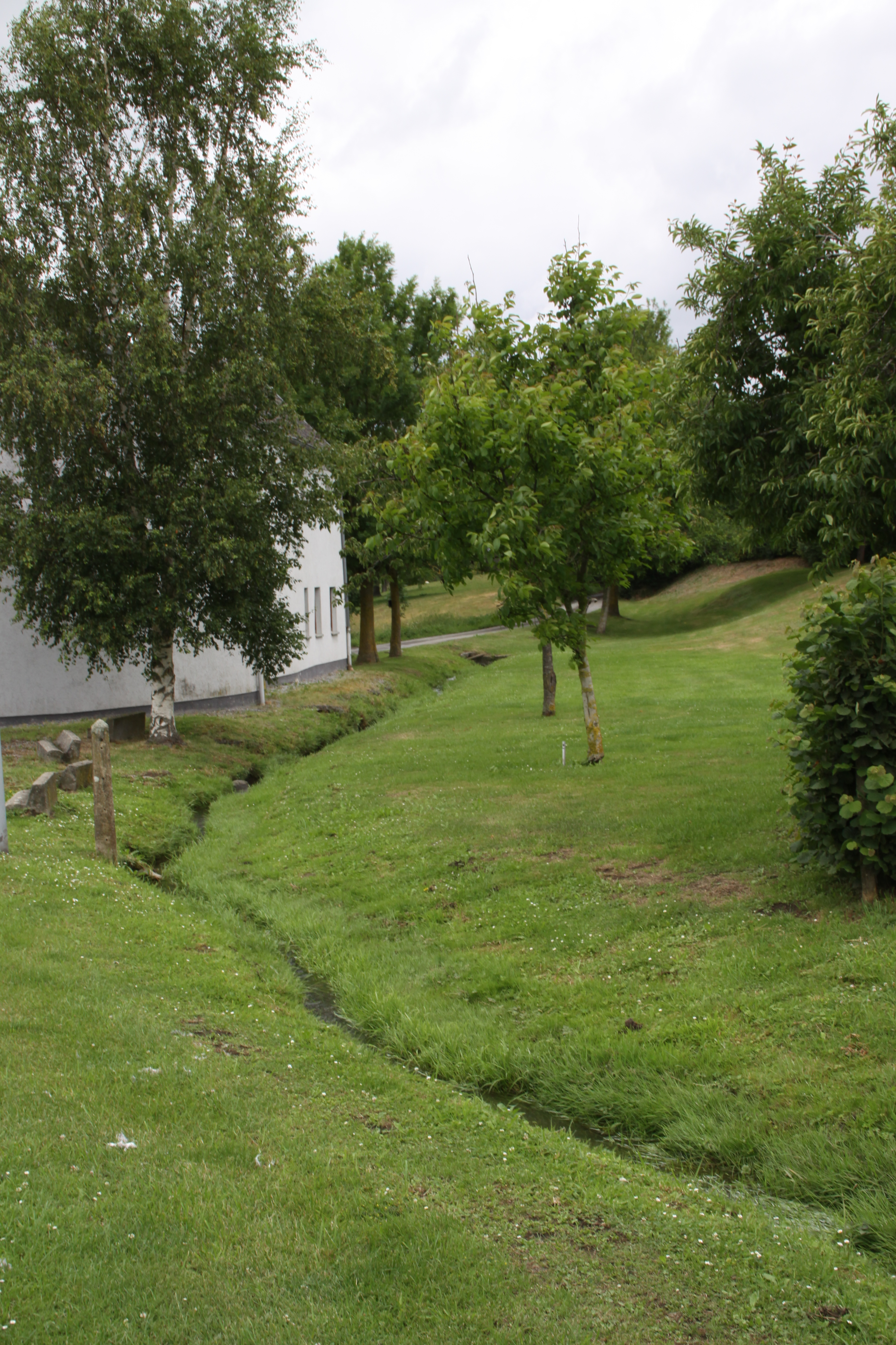 De Ruisseau de Monty 100 m no der Quell